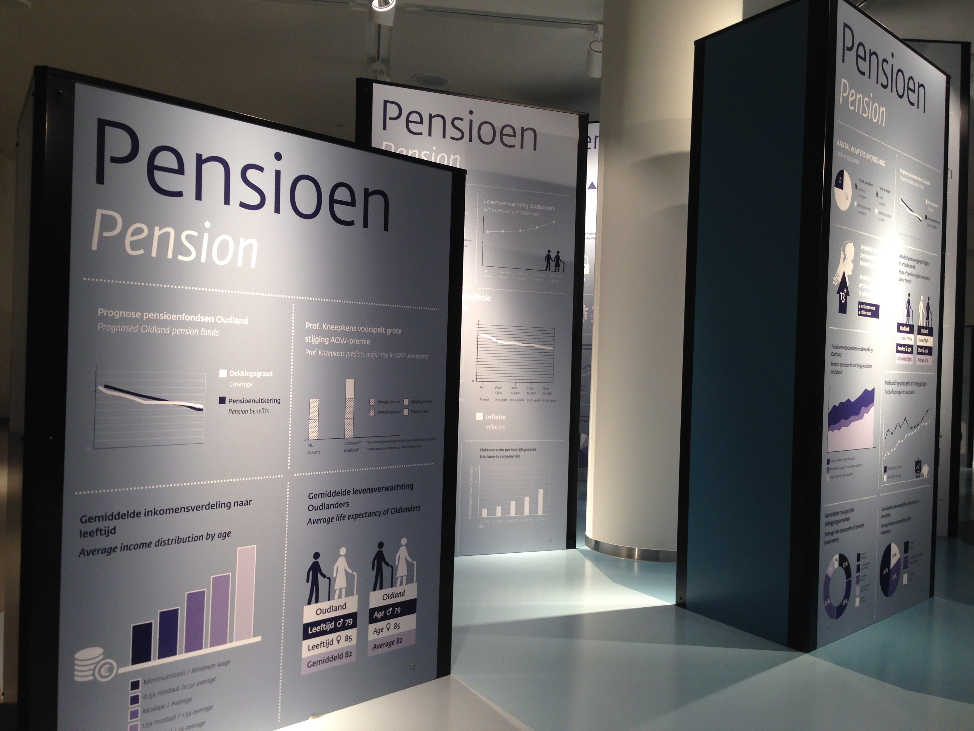 Expositiepanelen in visitor centre national bank of The Netherlands